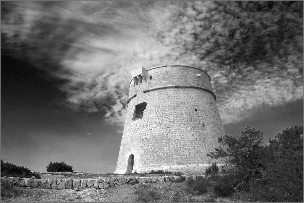 Torre de Sal Rossa (Sant Josep de sa Talaia)